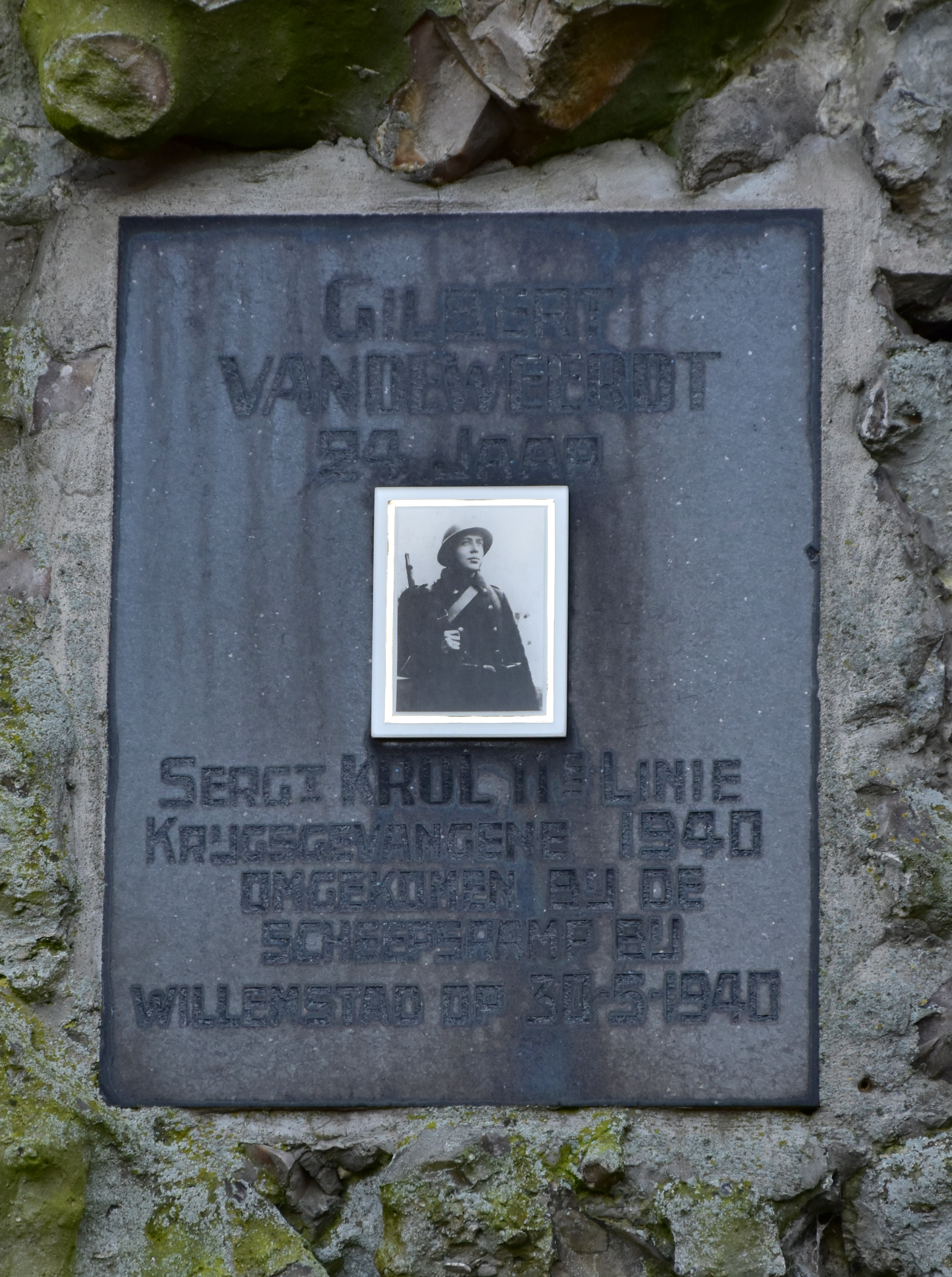 Gilbert Vandeweerdt Rhenus 127 (schip, 1922) Boorsem 28-12-2019 9-57-17